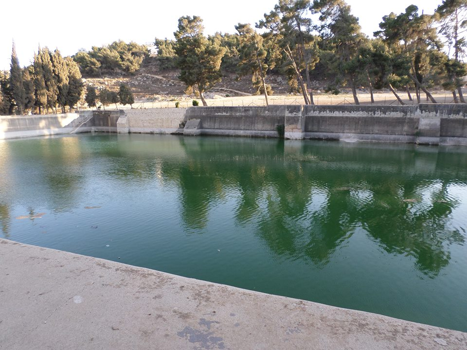 صورة حديثة لبركة السلطان في مدينة الخليل والتي بناها السلطان قلاوون أيام المماليك